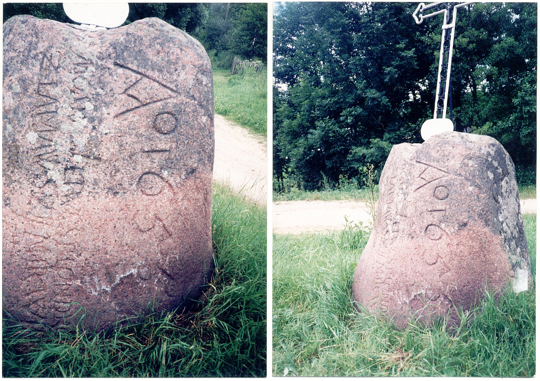 Pamiątkowy kamień we wsi Bierwicha (Polska) z napiszem:"A.D. 1655 Moskal Litwę splondrował złamawszy mir wieczny"